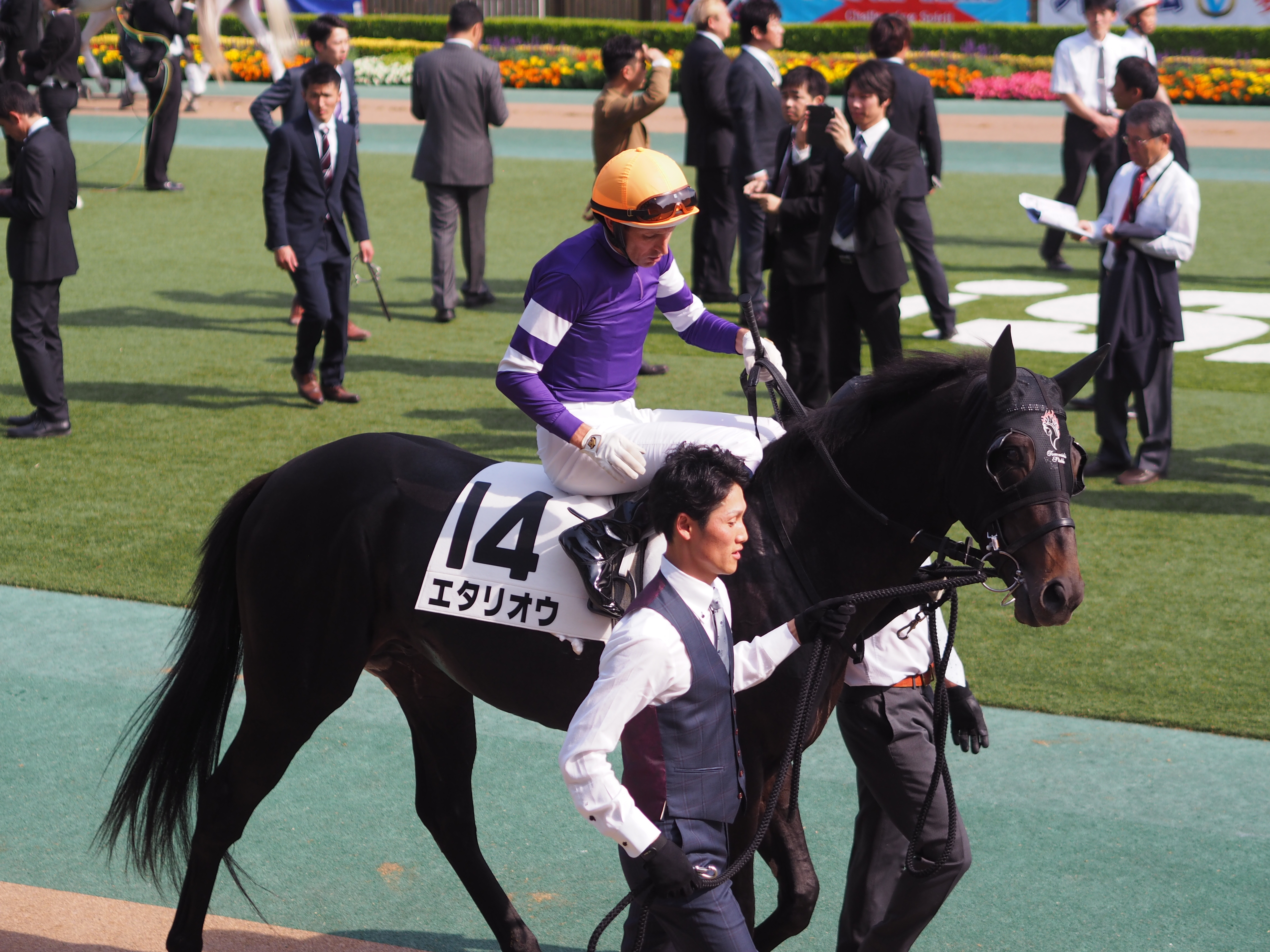 10R 東京優駿 日本ダービー